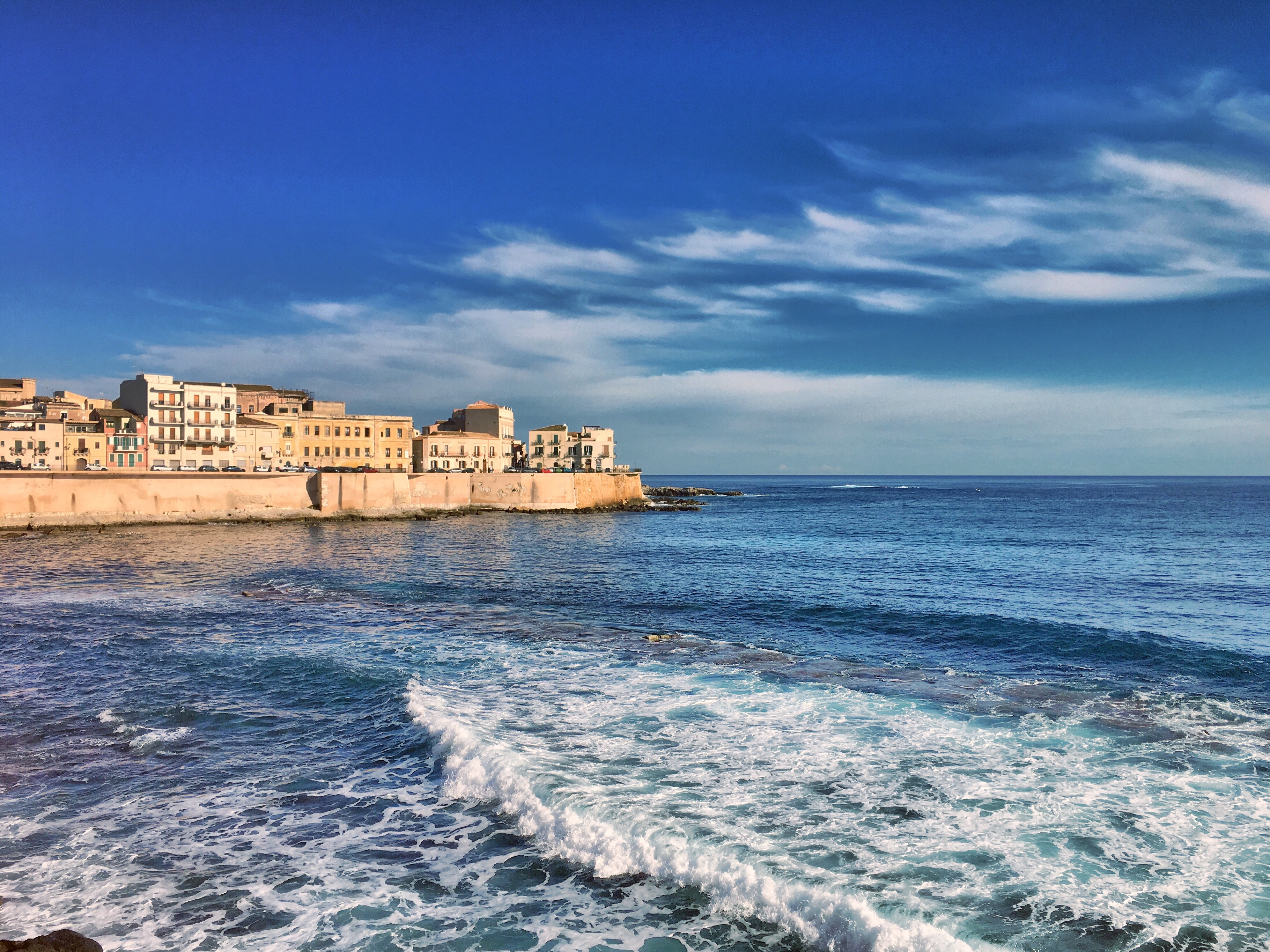 Costa di Ortigia, lato di Levante